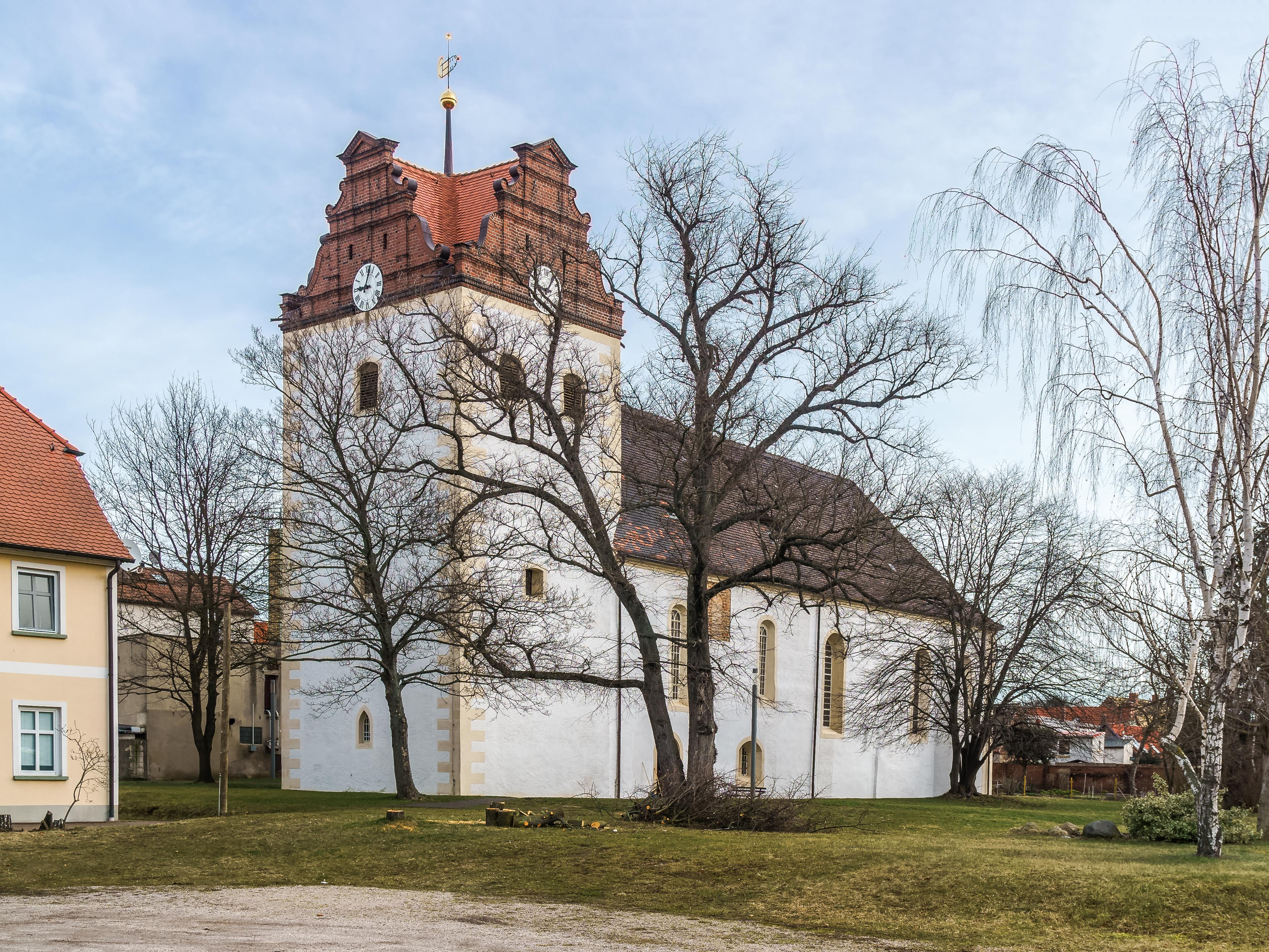 Ev. Stadtkirche in Löbnitz